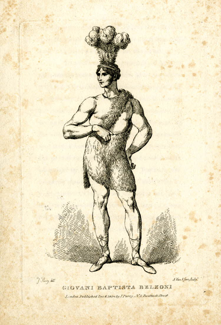 Portrait of Giovanni Baptista Belzoni, full-length, slightly turned to the left, one arm behind his back and the other tucked into his waistband, dressed in his strongman's costume of a fur loincloth with an ostrich feather headdress on his head and Roman sandals on his feet, illustration to a broadside descriptive of his circus performance as the Patagonian Sampson (1804)